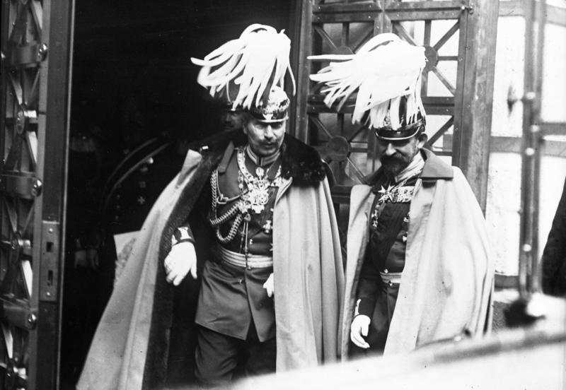 Wilhelm II. und der verstorbene König von Rumänien in Berlin